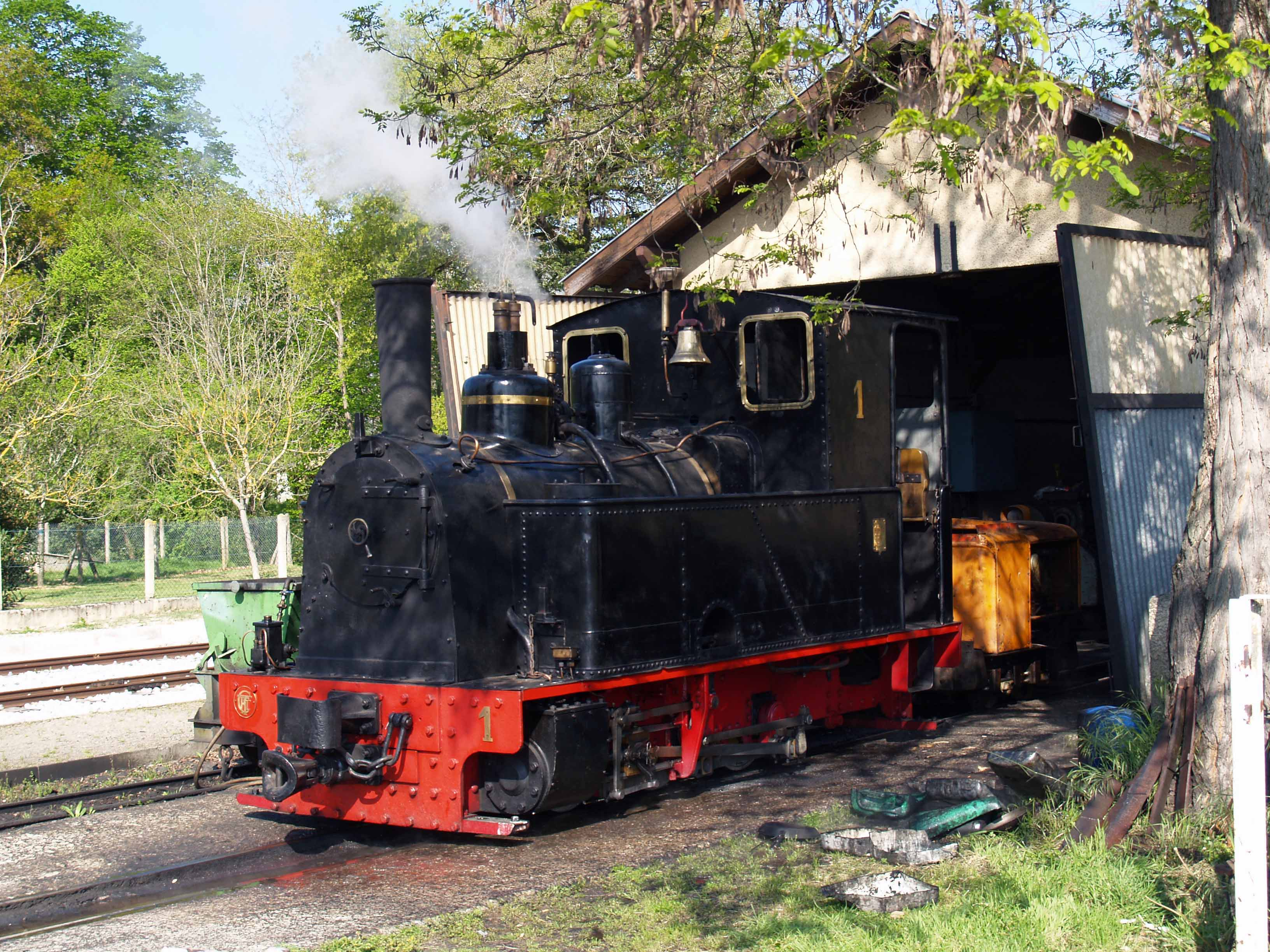 Locomotive Couillet 030T des Chemins de fer touristiques du Tarn.